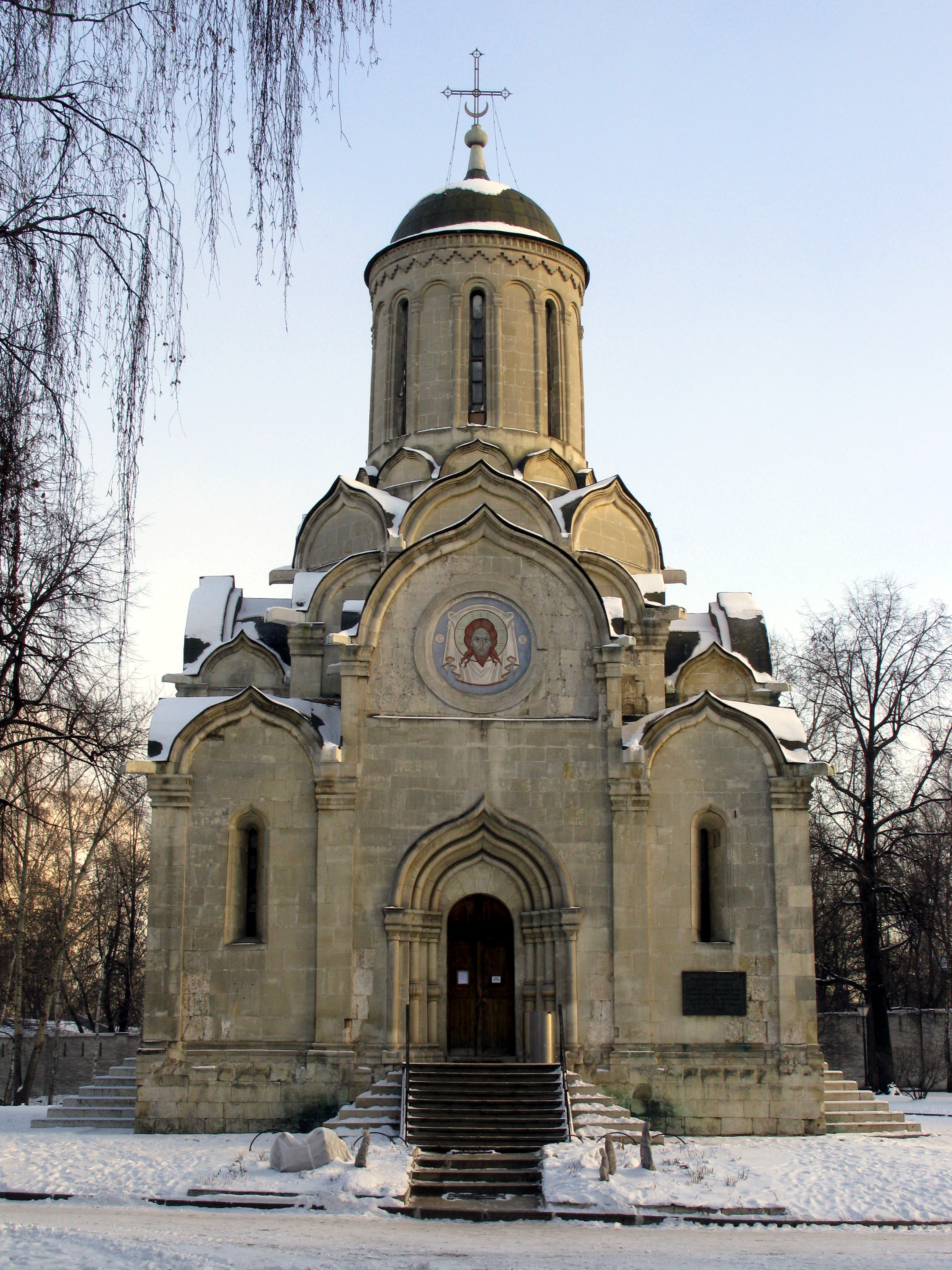 Спасский собор (Андроников монастырь)